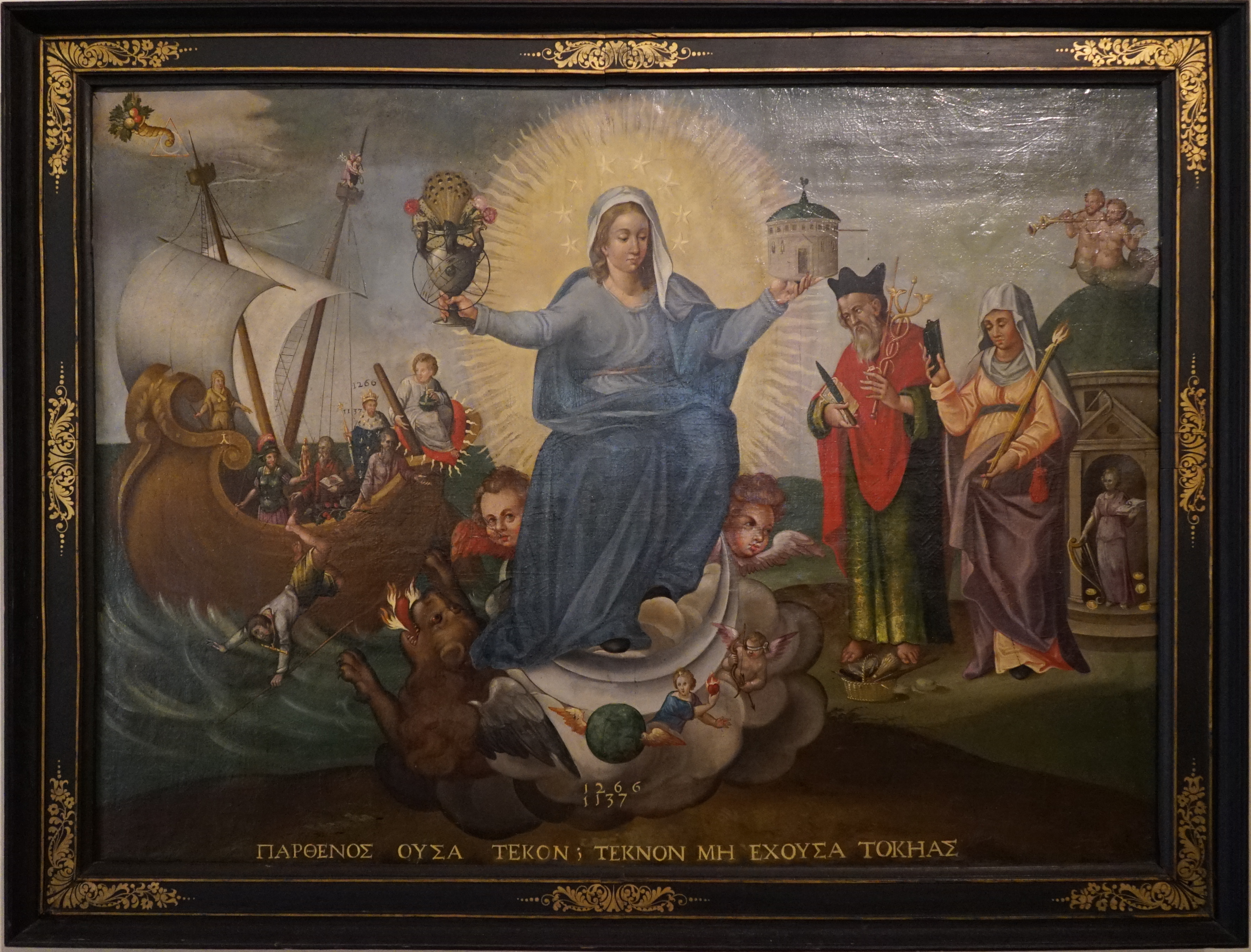 présenté au musée st-Remi.